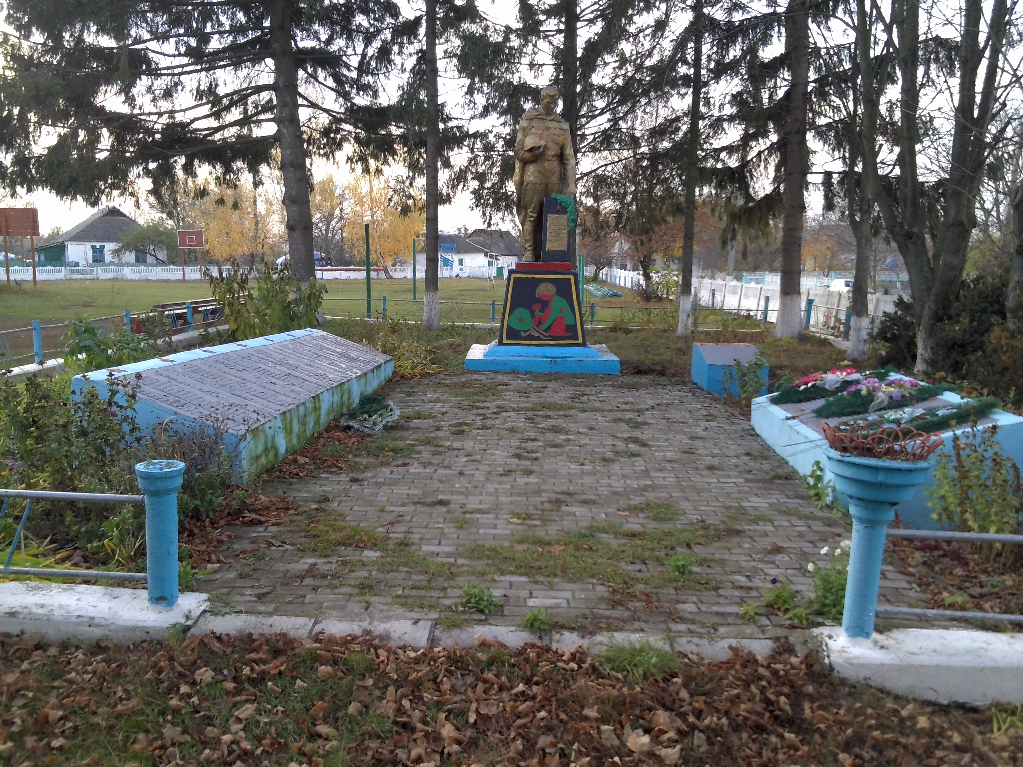 с. Вербівка. Братська могила 305 воїнів Радянської Армії, загиблих при звільненні села